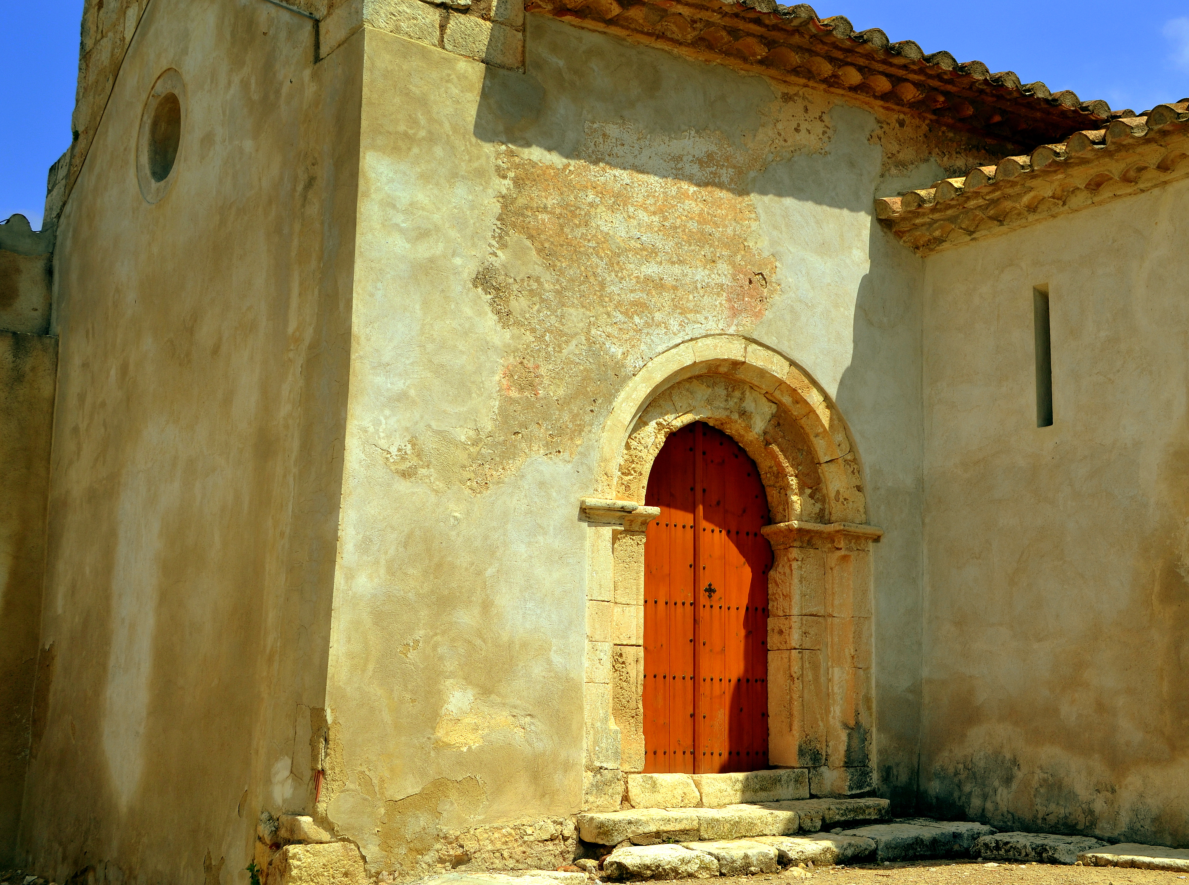 Sant Valentí de les Cabanyes va ser la primera fundació de l’ordre de l’Hospital de Sant Joan de Jerusalem al Penedès i un dels seus primers establiments a Catalunya, documentada ja el 1135 com l’Hospital de Sant Valentí, dins el terme del castell d’Olèrdola.